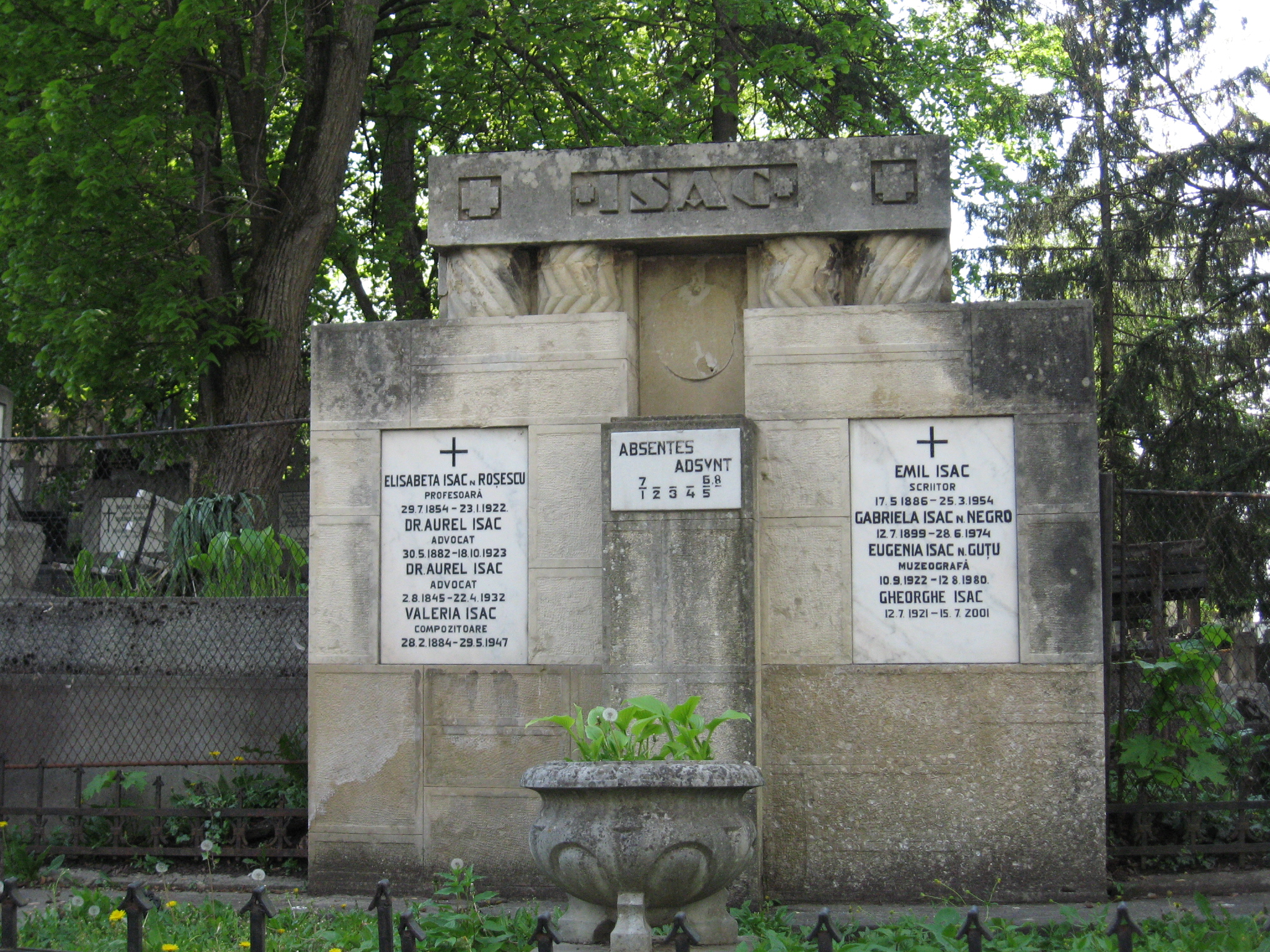 Emil Isac sírja a kolozsvári Házsongárdi temetőben.